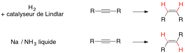 Générée avec ChemDraw for Mac